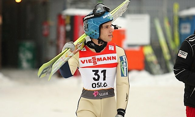 Władimir Zografski podczas serii treningowej przed konkursem indywidualnym mężczyzn na Mistrzostwach Świata w Narciarstwie Klasycznym 2011 w Oslo.